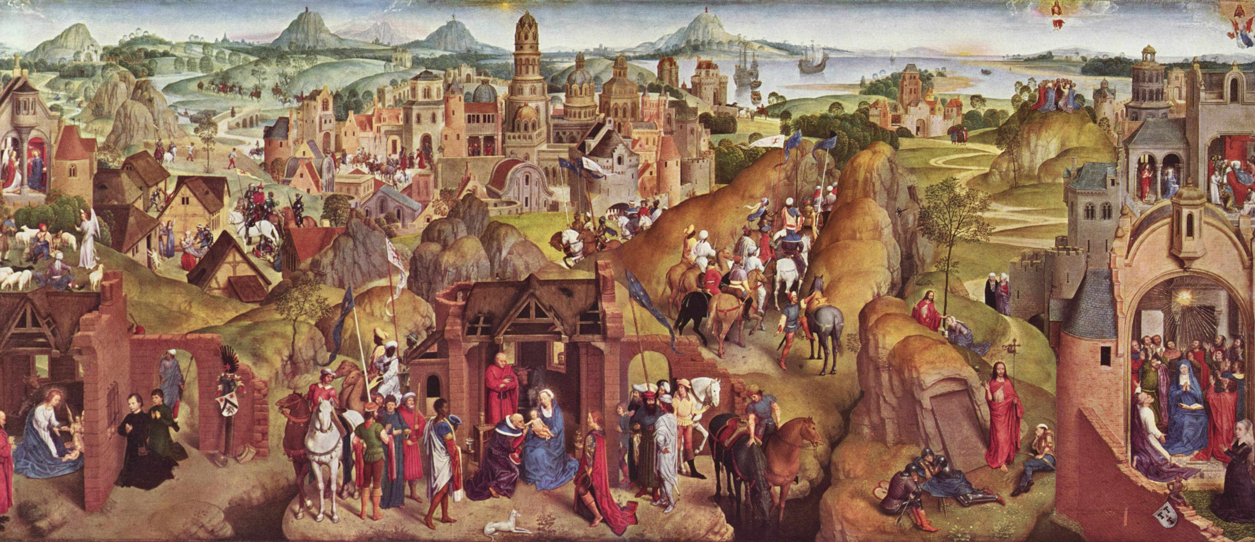 In der Bildmitte wird detailreich die Legende der Heiligen Drei Könige dargestellt. Im linken Bildviertel sieht man Szenen aus dem Leben Marias, im rechten Bildviertel u. a. die Geschichte Christi nach seiner Auferstehung. Der Stifter Pieter Bultync ist links mit seinen Söhnen dargestellt, seine Frau Katharina van Riebeke rechts.